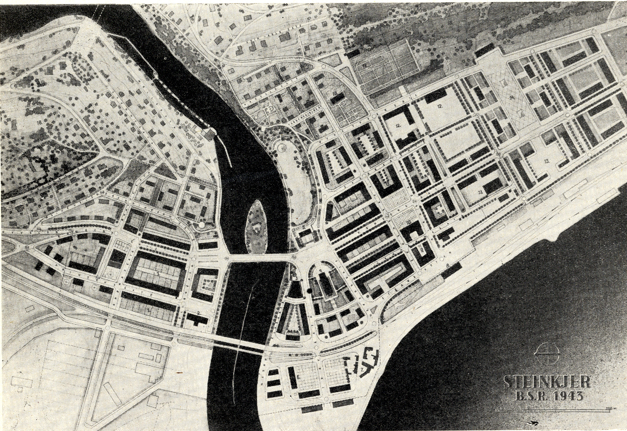 BSR v/Sverre Pedersen utformet denne reguleringsplanen for Steinkjer i 1943